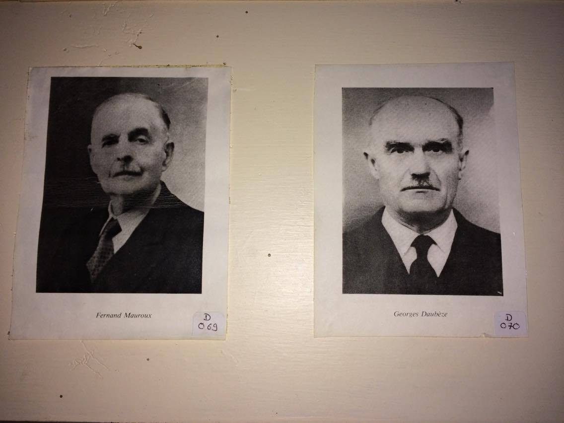 Portrait photo pris au musée de la Résistance à Auch